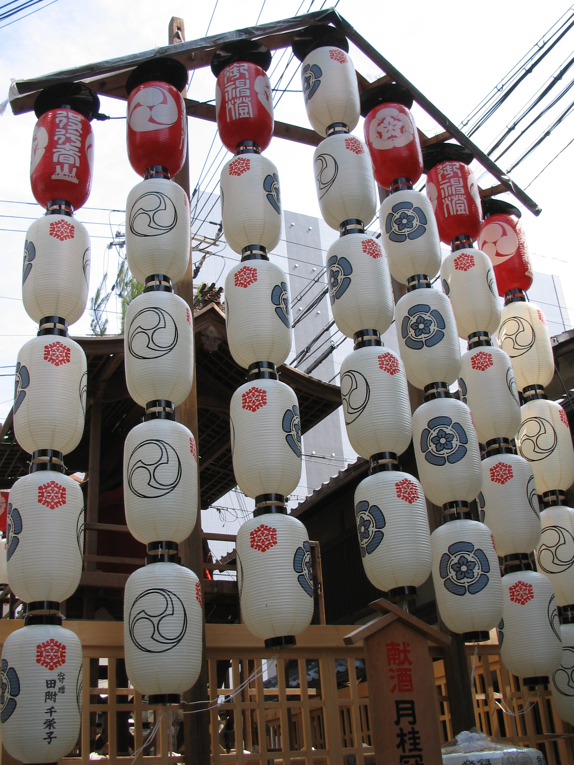 Gion matsurin paperilyhtyjä.祇園祭関係